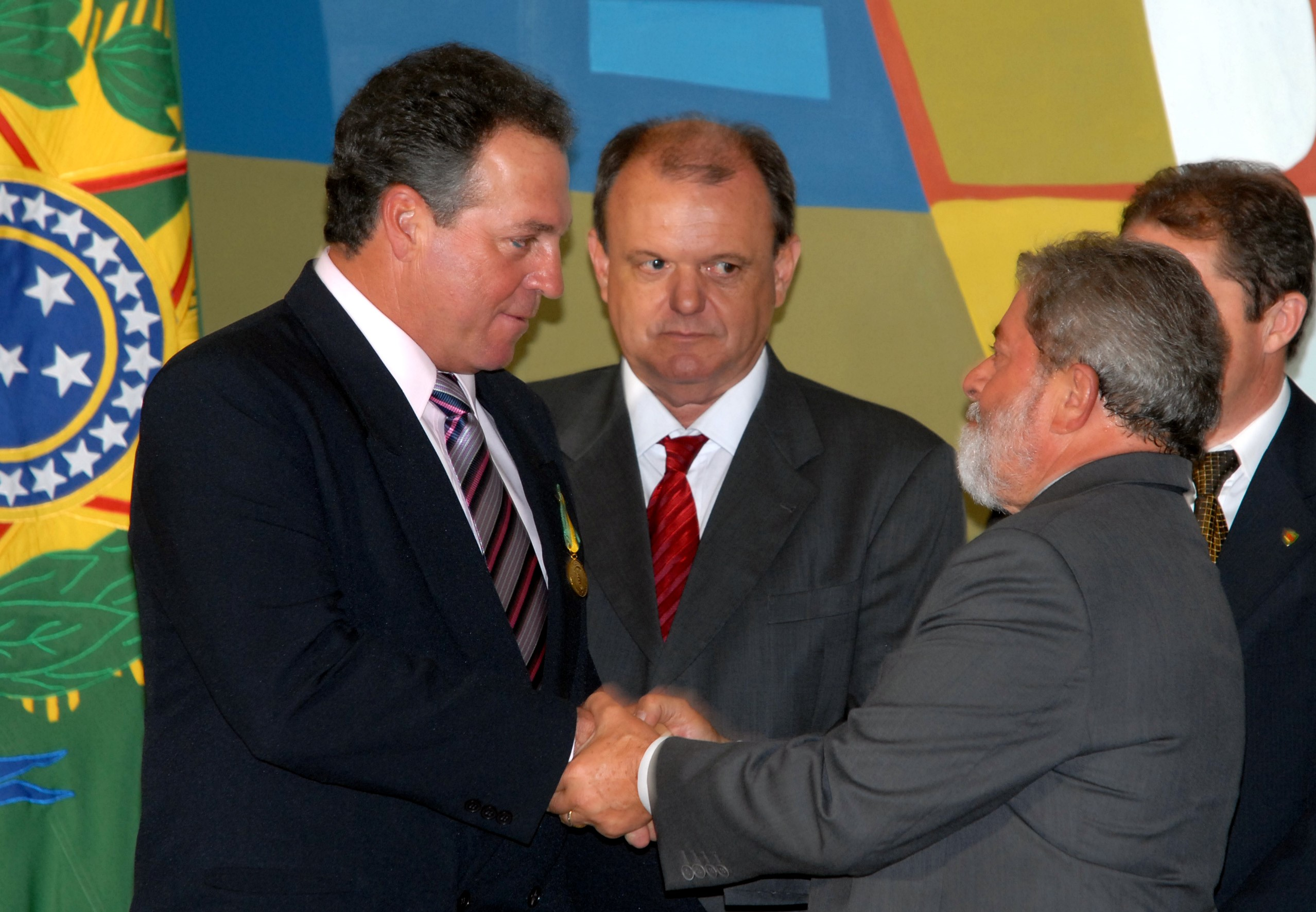 O presidente Lula cumprimentando técnico Abel Braga.